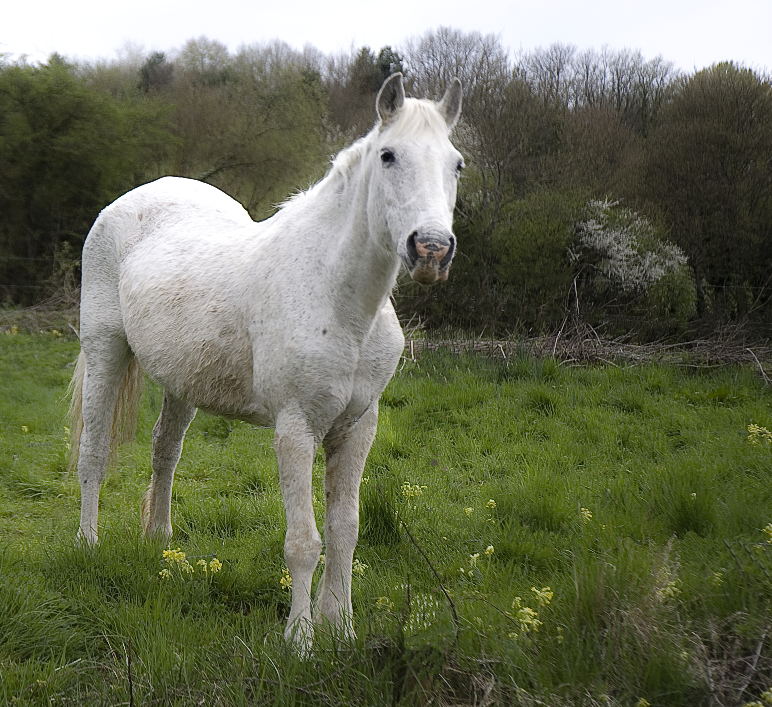 poulain